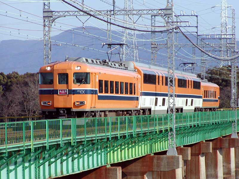 近鉄 30000系ビスタカー